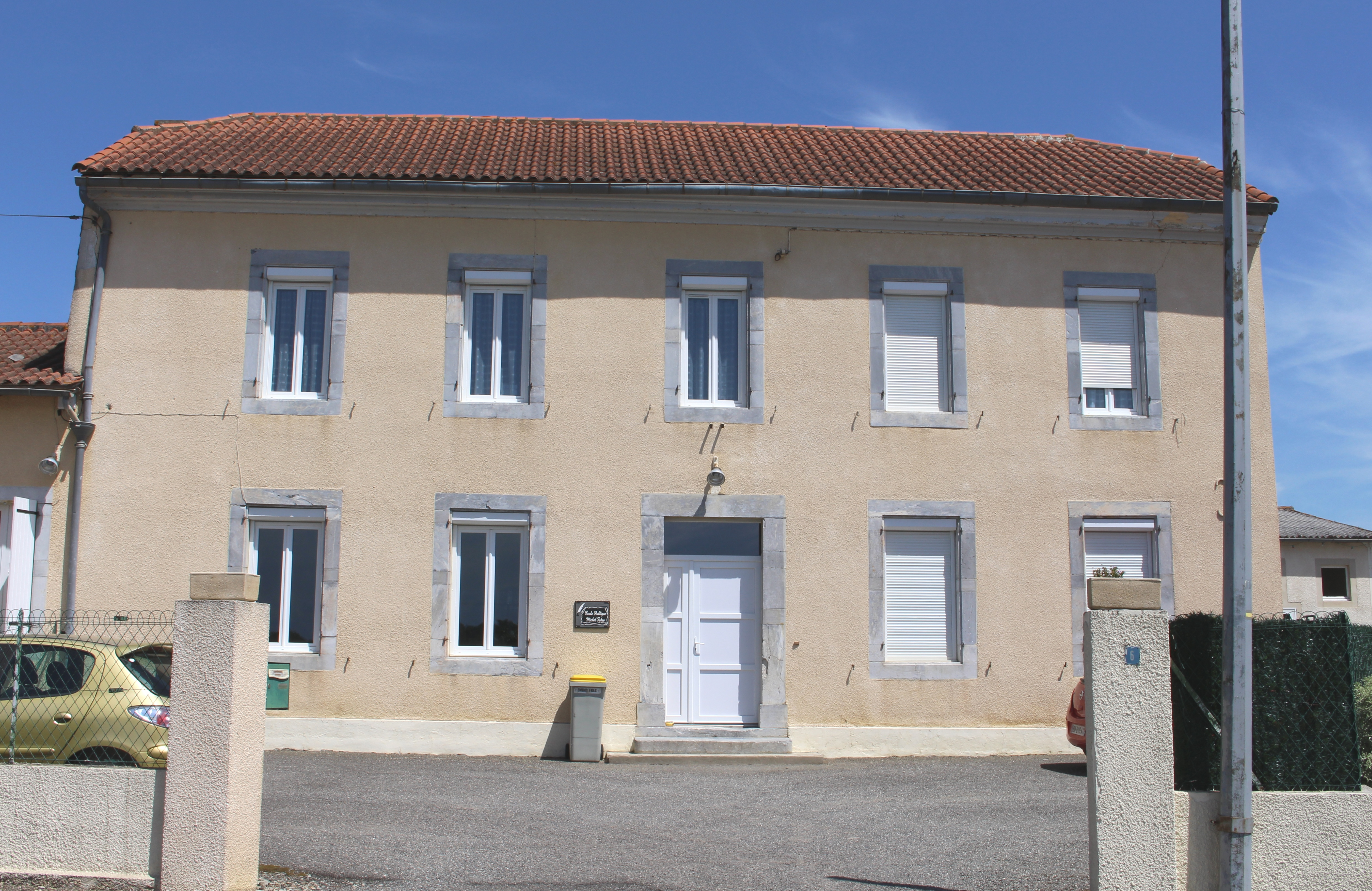 École de Sénac (Hautes-Pyrénées)